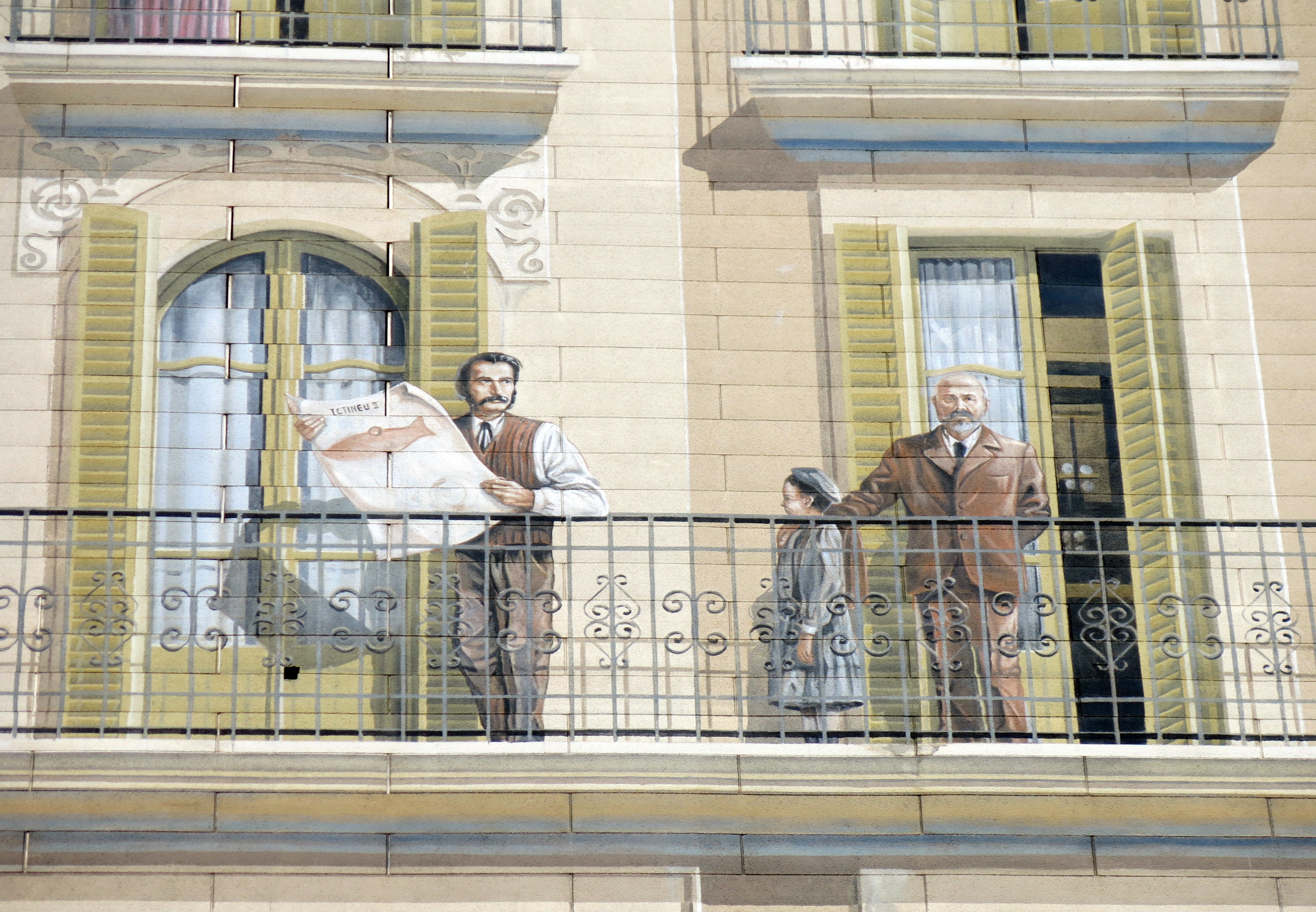 Balcons de Barcelona (Cité de la Création). Pl. Hispanitat amb c. Enamorats, 3 (Barcelona)